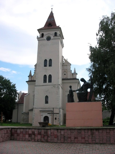 м. Рогатин